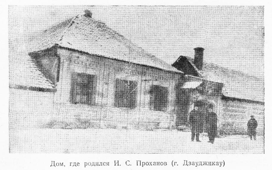 Дом, где родился И. С. Проханов в г. Дзауджикау (Владикавказ)